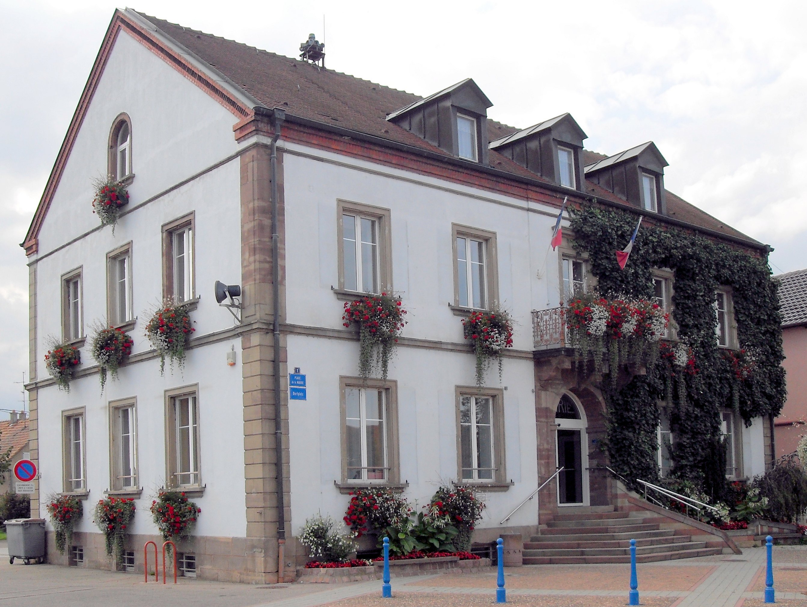 La mairie d'Ungersheim